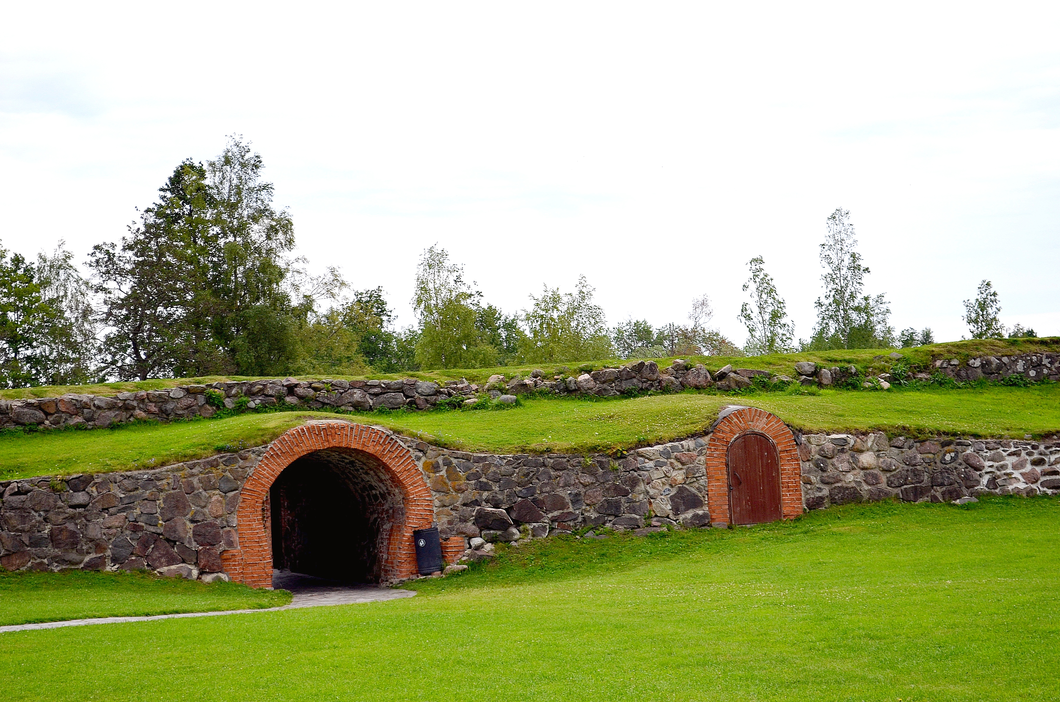 Крепость Корела. Водяные ворота: шоссе Ленинградское, 3, Приозерск, Приозерский район, Ленинградская область